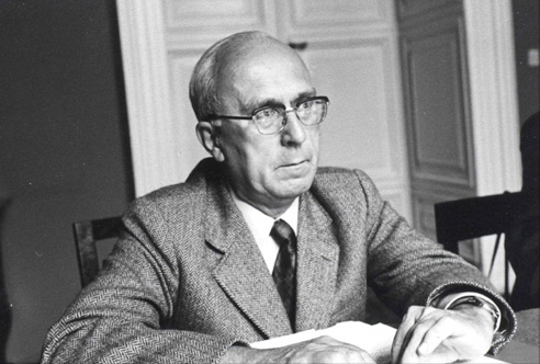 L'historien des sciences français René Taton (1915-2004). Portrait en noir et blanc.